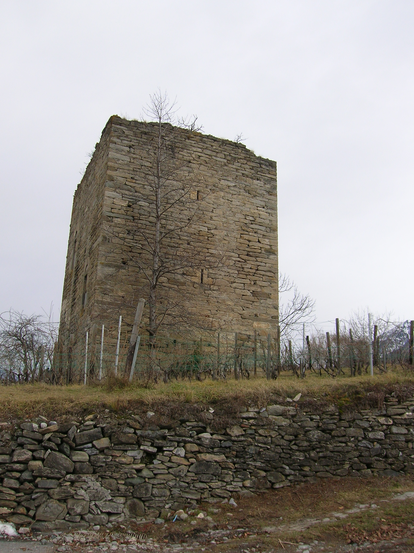 Torre di la Plantaz, lato ovest, Gressan, Valle d'Aosta, Italia.